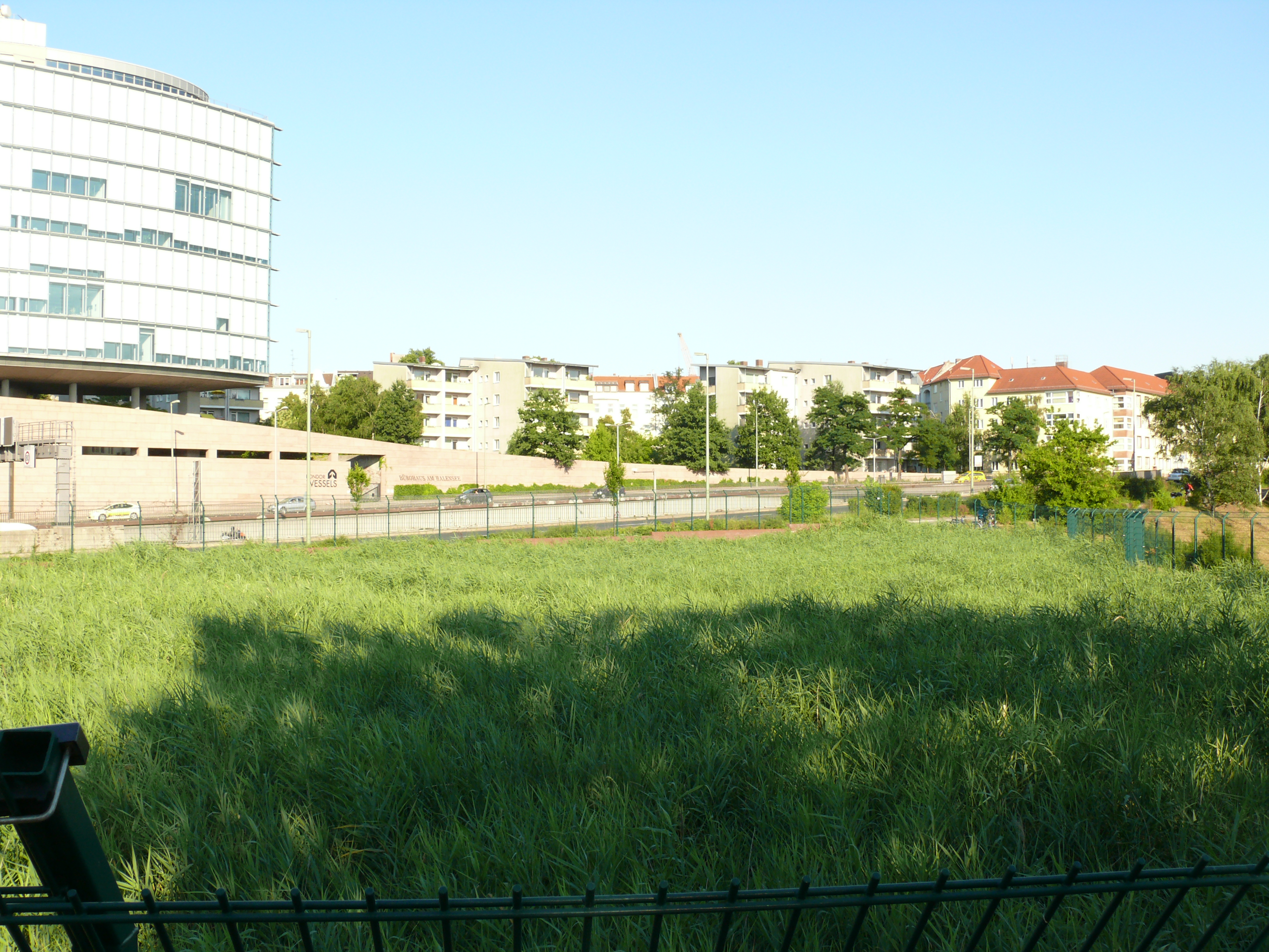 Berlin-Grunewald Filteranlage am Halensee